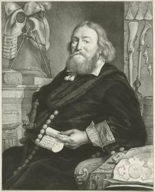 Портрет Андрія Д. Вініуса.